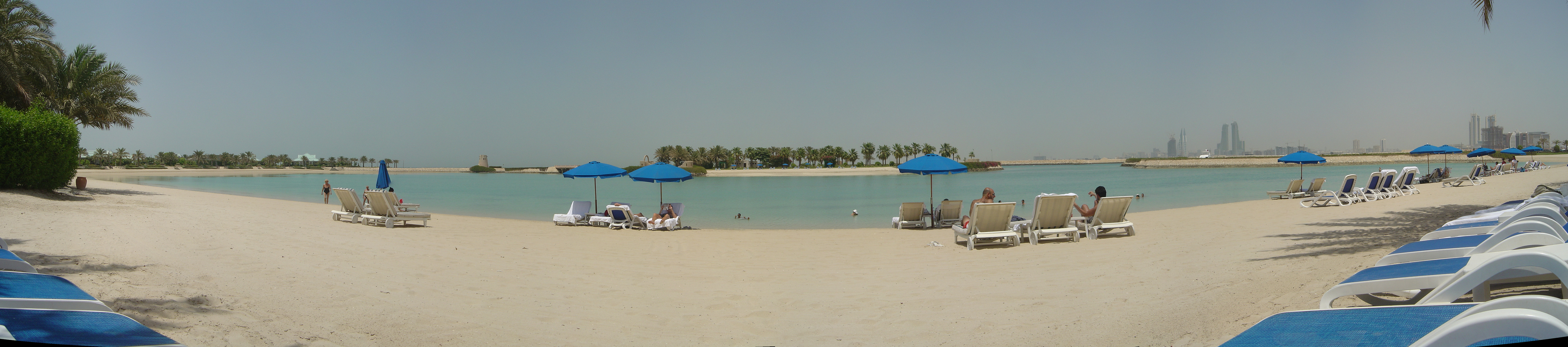 Ritz Carlton bahrain Hotelstrand